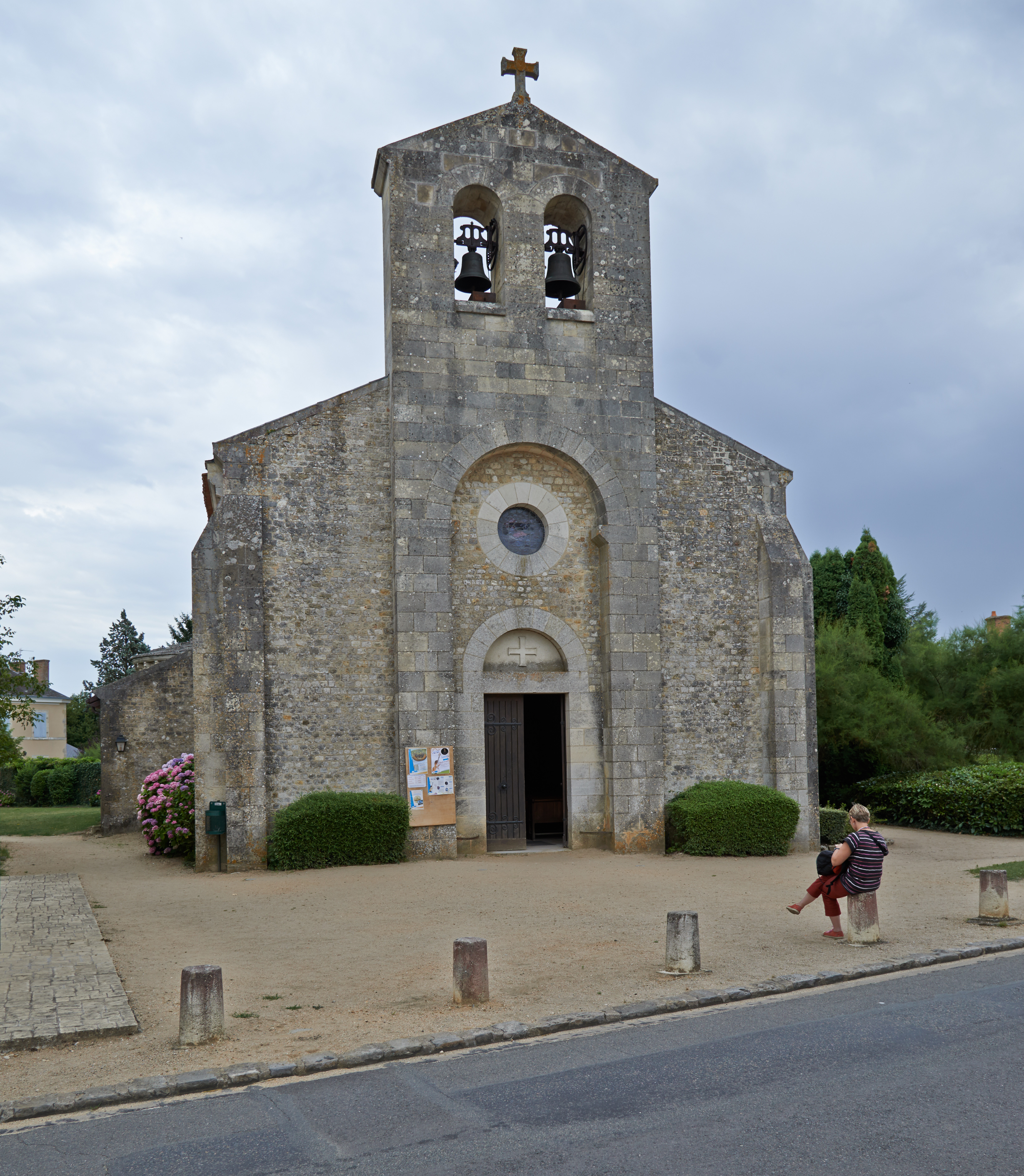 Église de la Très-Sainte-Trinité de Germigny-des-Prés